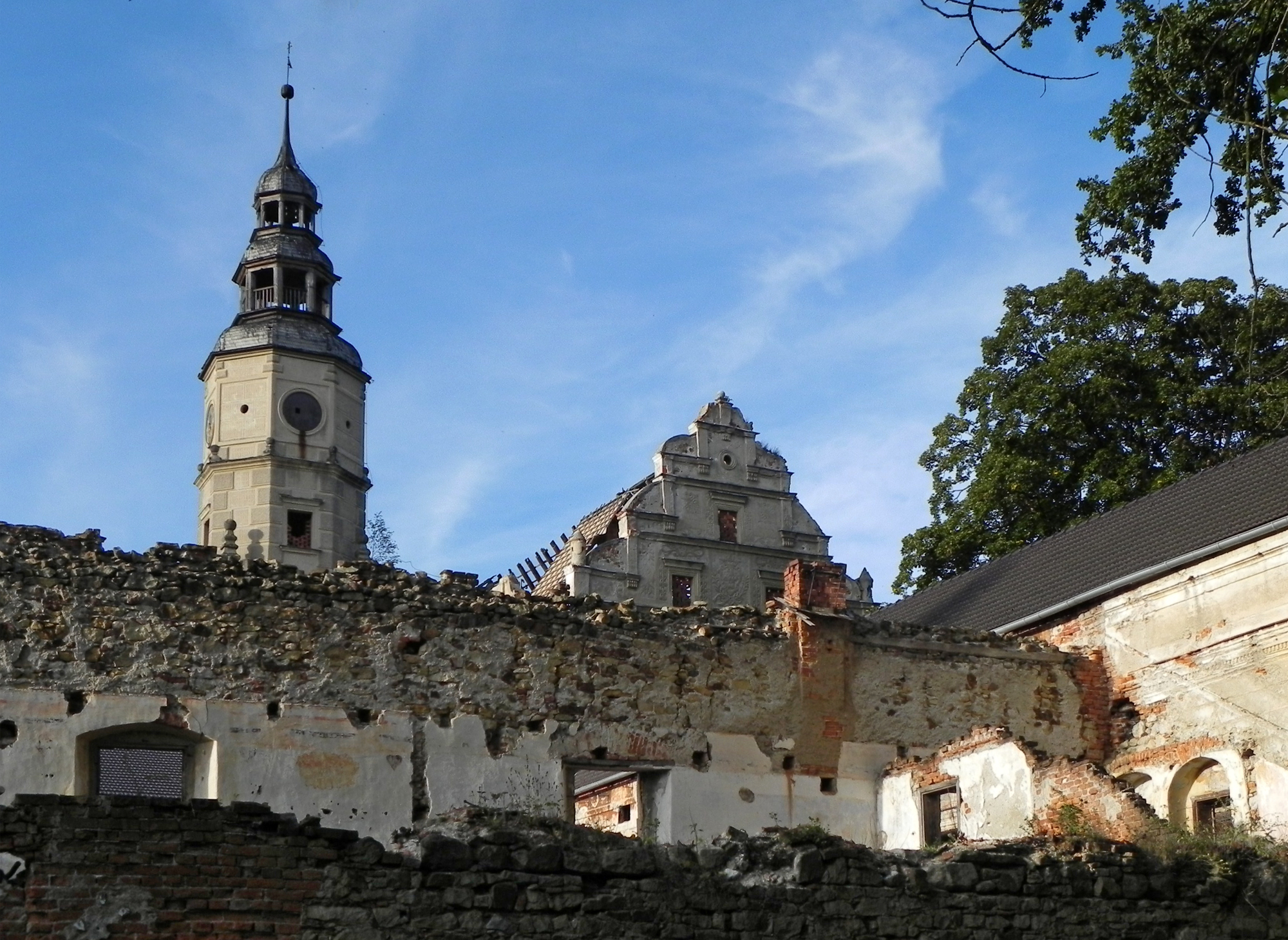 Gorzanów - zespół zamkowy: zamek (zabytek nr rejestr. 458)